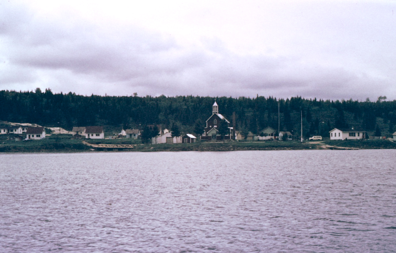 Une partie de Manouane vue du lac, vers 1971